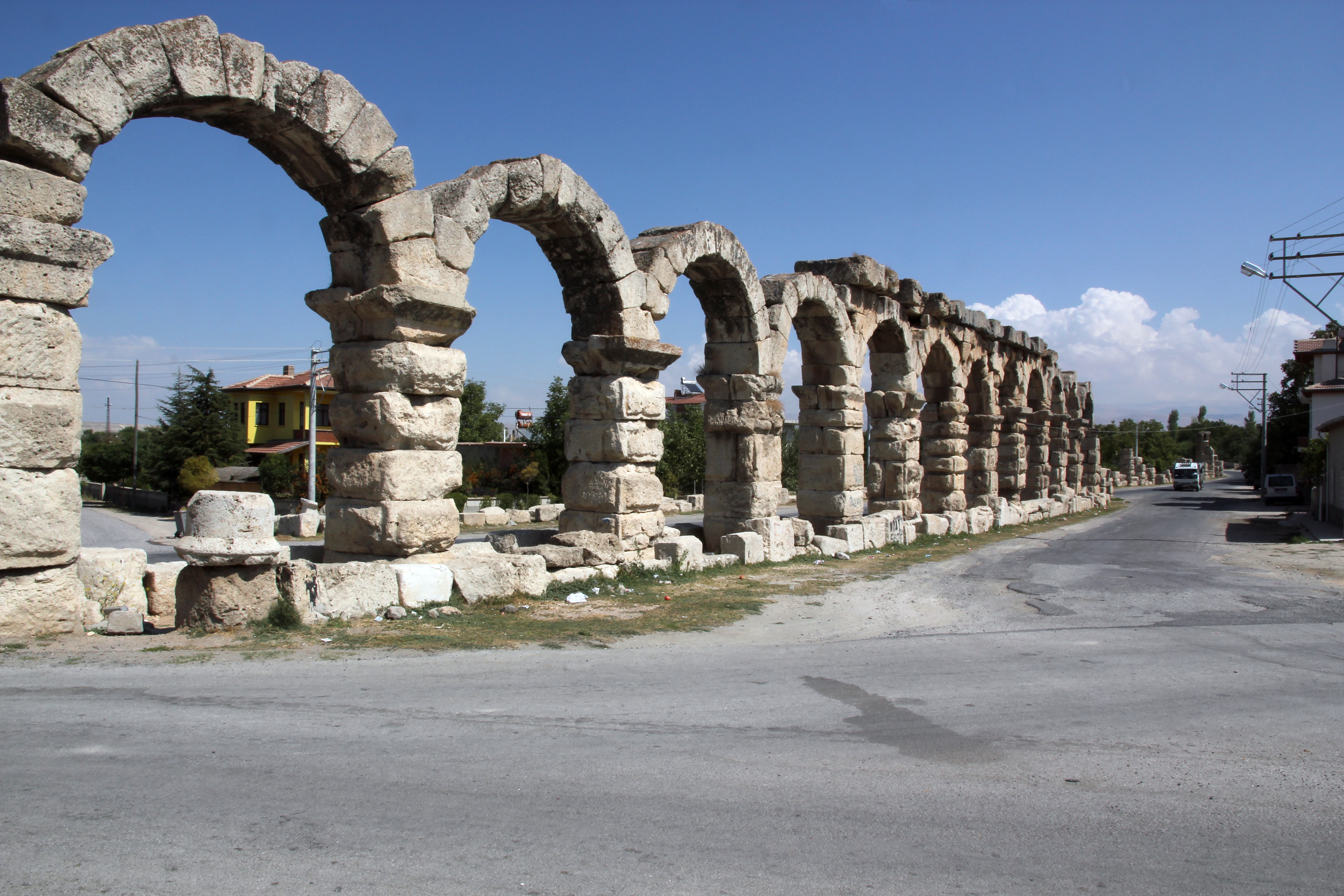 Tyana, römische Ruinen in Kemerhisar, Zentraltürkei, Aquädukt